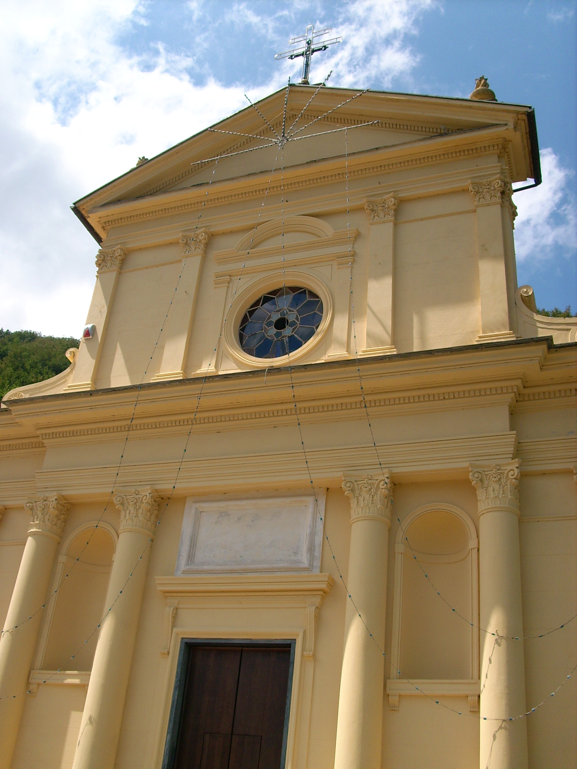 Chiesa di Canevale, frazione di Coreglia Ligure, Liguria, Italia